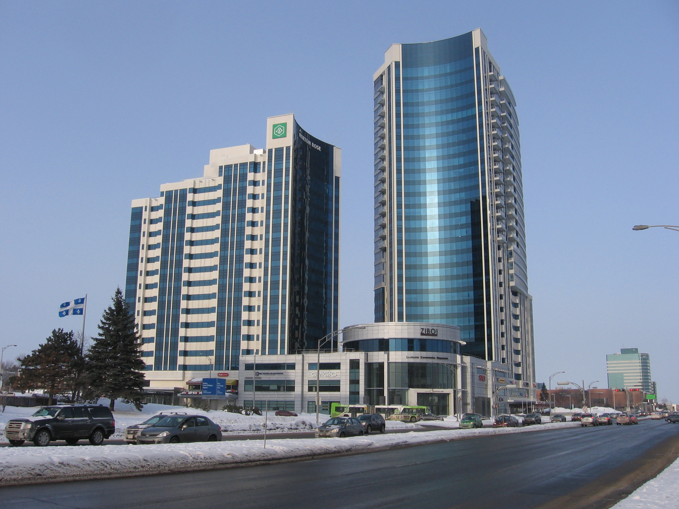 Complexe Jules Dallaire